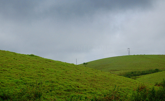 വാഗമൺ